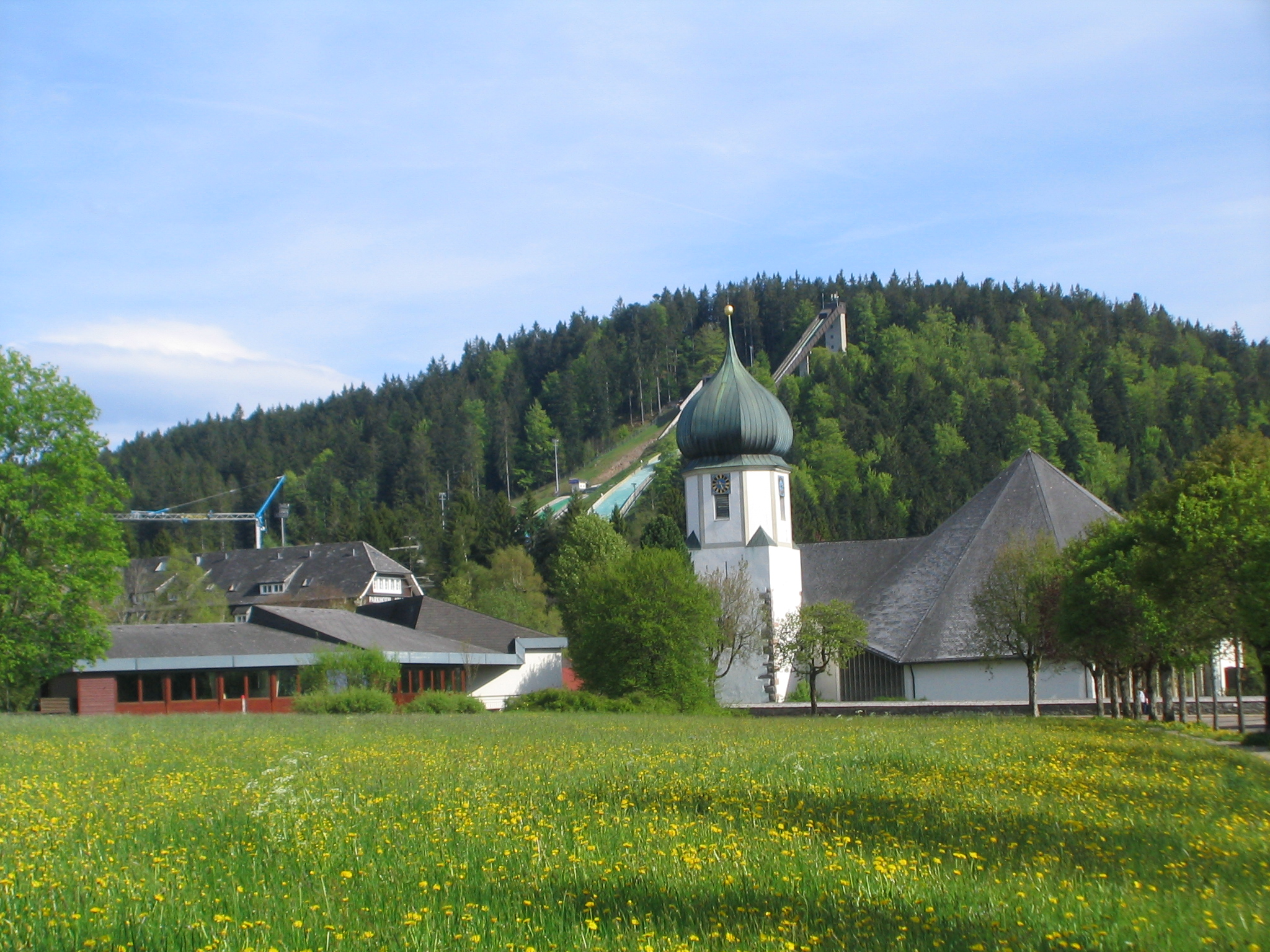 Die Kirche von Hinterzarten von der Kirchwiese aus gesehen